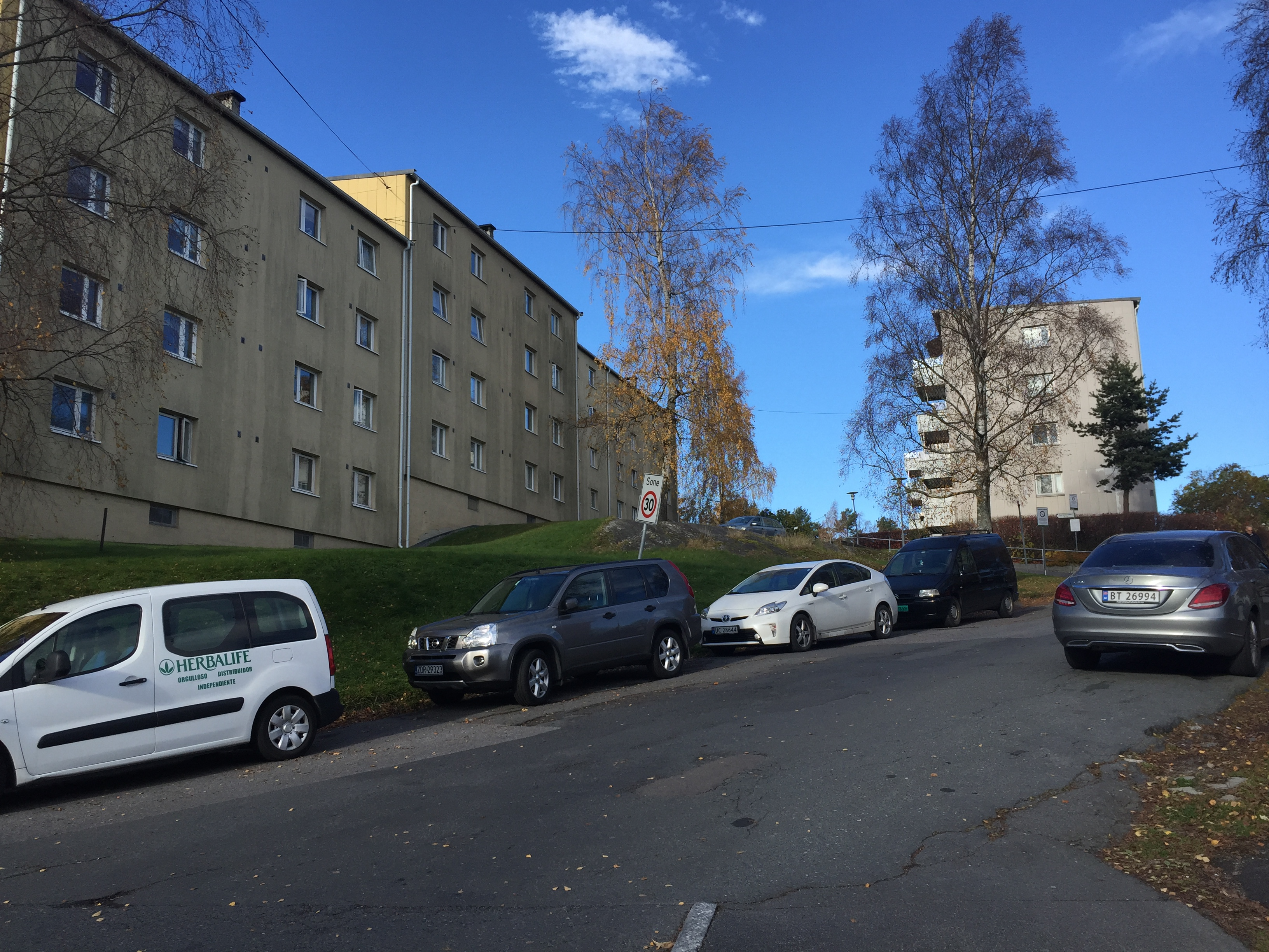 Libakkfaret på Brattlikollen i Oslo.